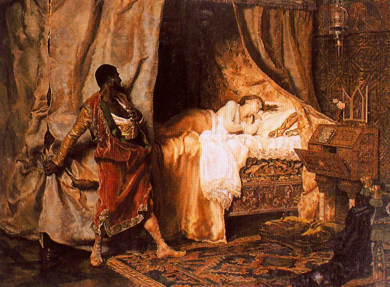 Otelo y Desdémona por Muñoz Degrain, pintura de 1881. Antes en el Museo de Chiado, Lisboa; ahora, en Museo Soumaya.Fundación Carlos Slim